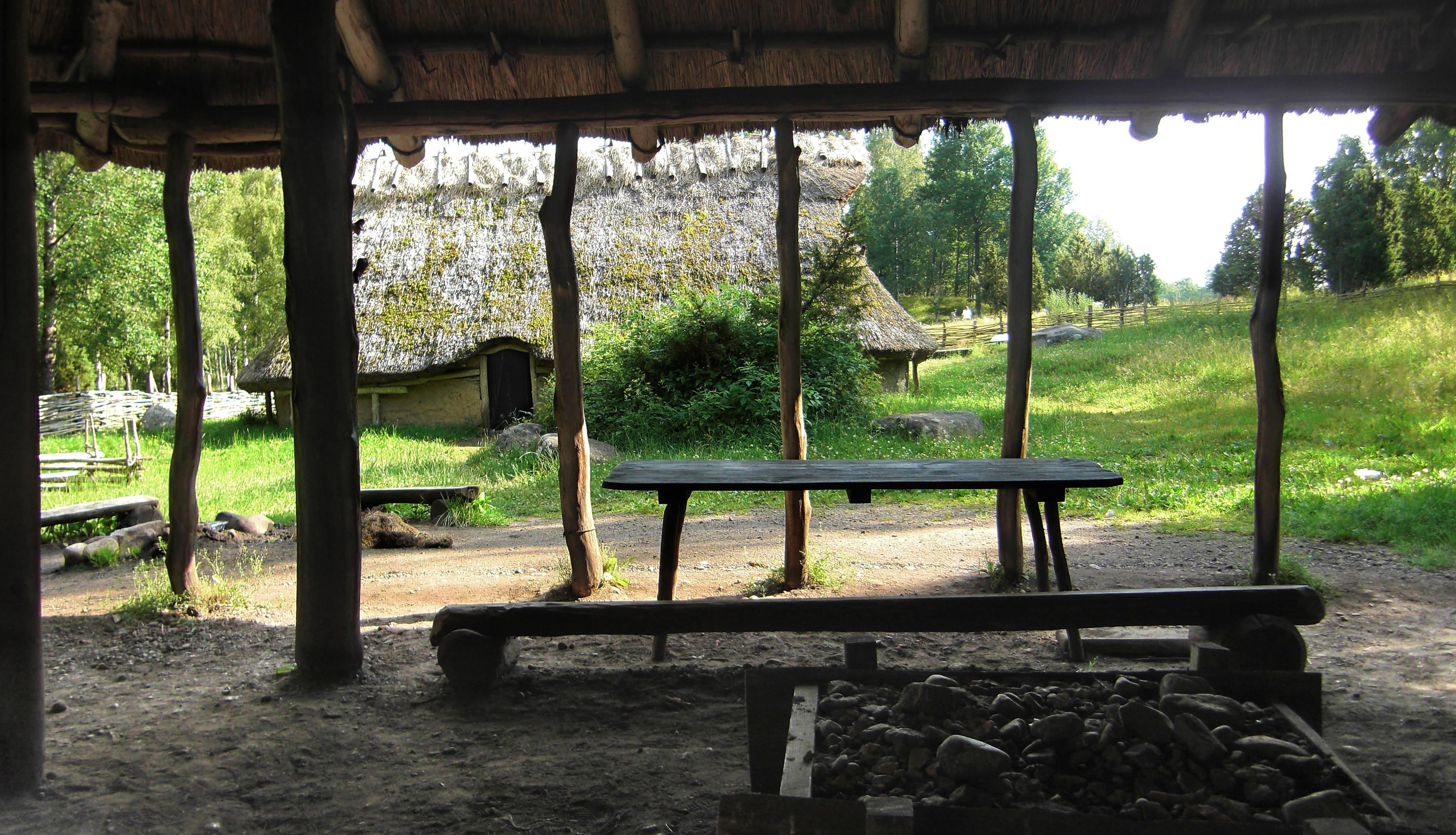 Friluftsmuseet Ekehagens forntidsby ligger intill Ätran i Norra Åsarps socken i södra delen av Falköpings kommun, Västergötland, Västra Götalands län, Sverige. I byn finns uppbyggda hyddor och hus från både mesolitikum, neolitikum, bronsålder och järnålder. På bilden är bronsålderhuset sett ifrån bronsgjutarverkstaden.